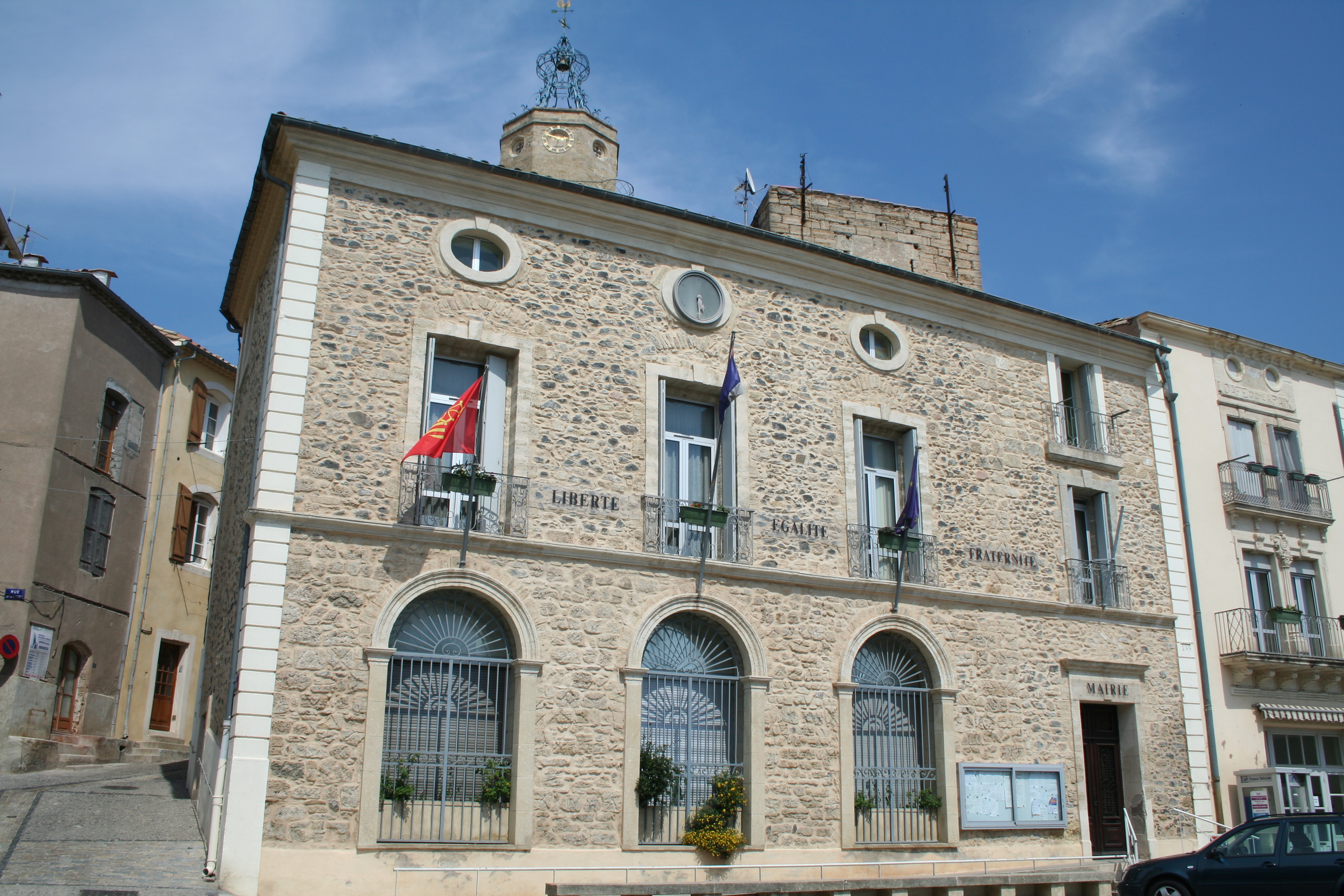 Caux (Hérault) - mairie.